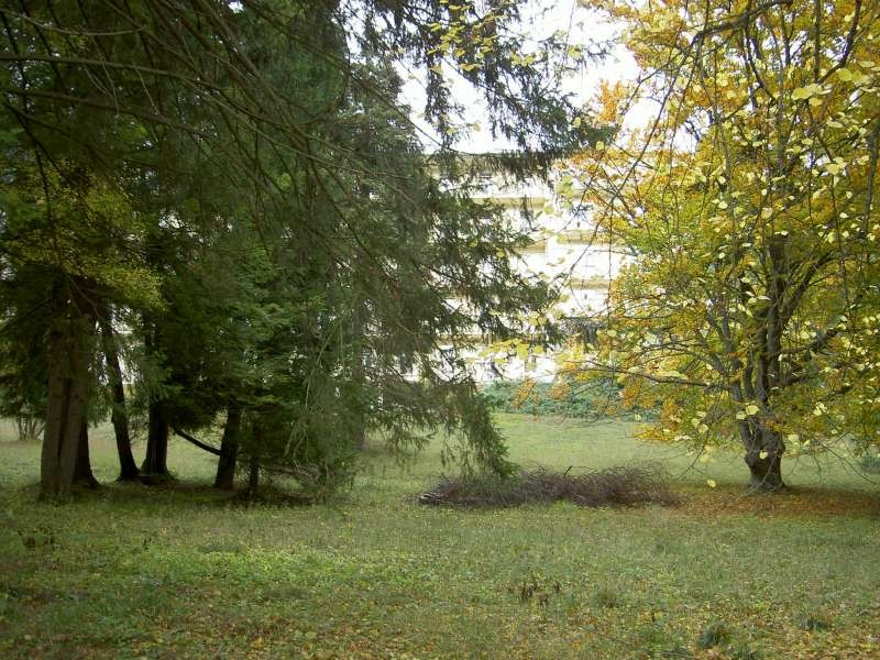 Park des Sanatoriums Wienerwald im Oktober 2007